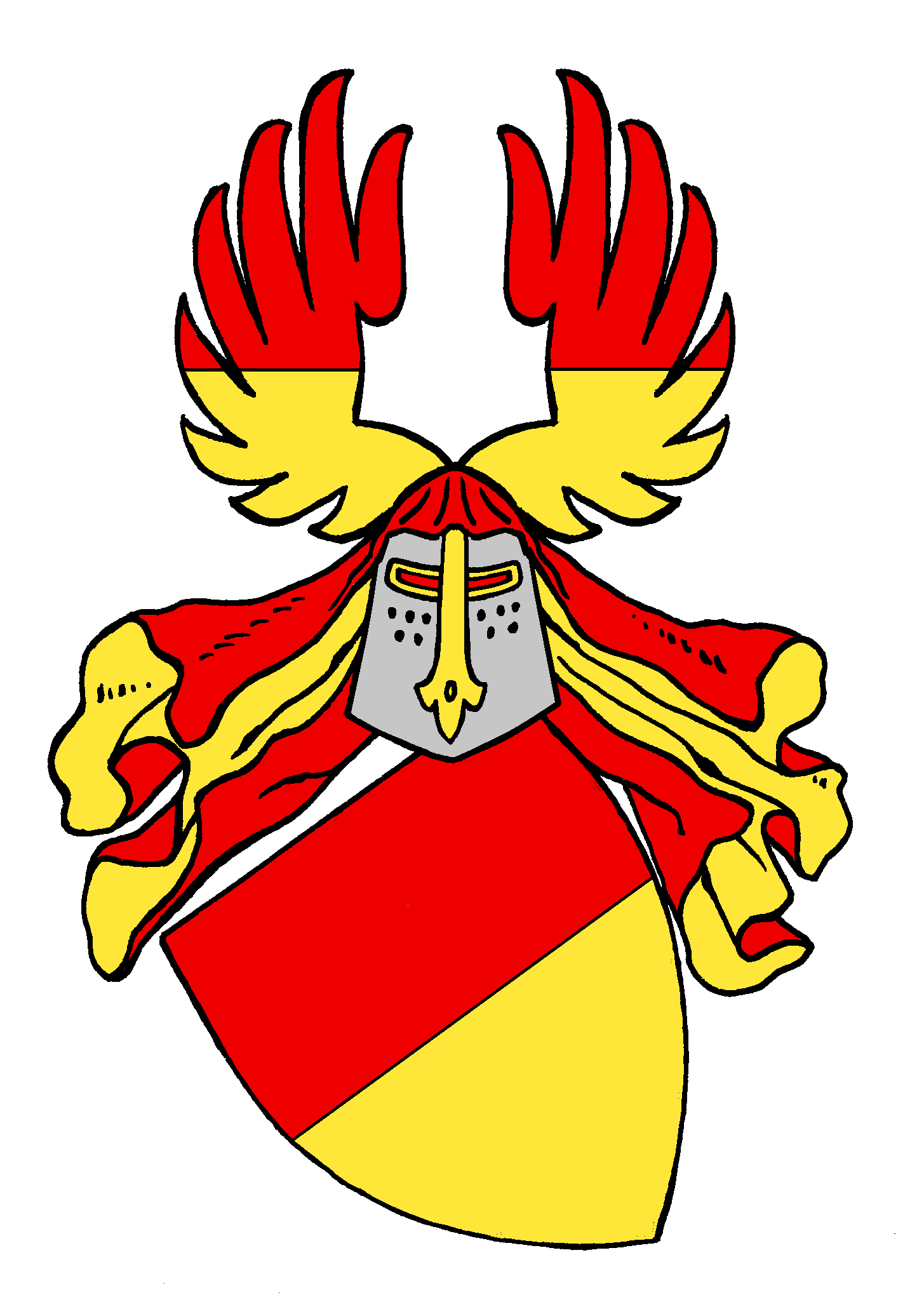 Stammwappen der altgräflichen Grafen von Schwerin (mit der ursprünglichen Helmzier, einem offenen Flug), deren Territorium später an die Mecklenburger Fürsten kam.